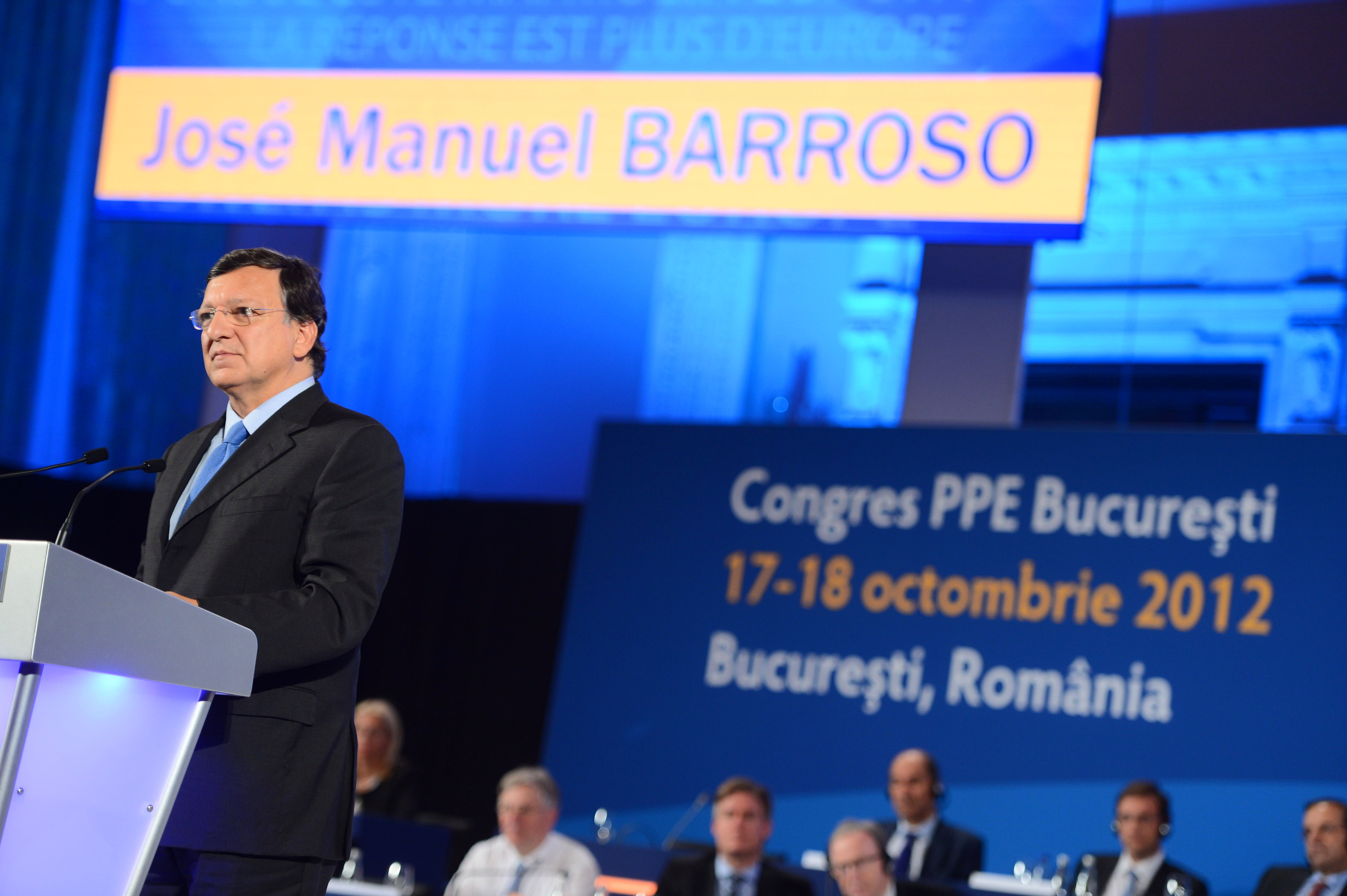 José Manuel Barroso